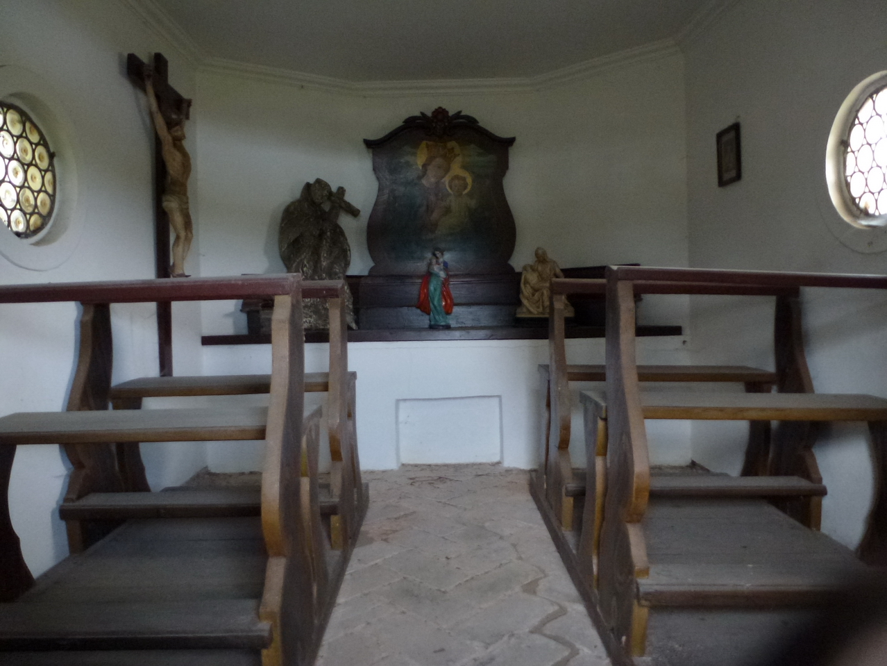 Innenansicht der Kapelle St.Maria in Alling-WagelsriedThis is a photograph of an architectural monument.